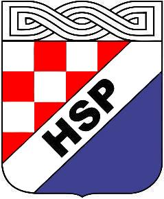 Grb Hrvatske stranke prava